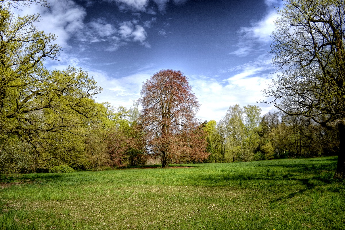 Jaro v zámecké zahradě